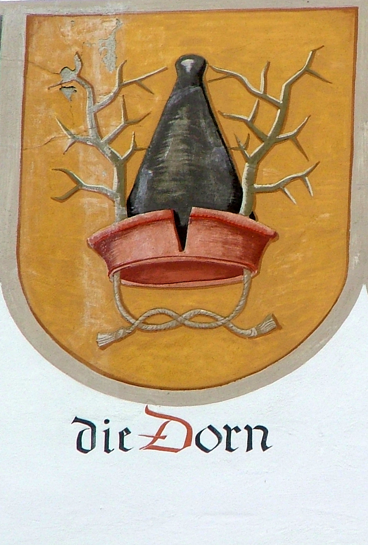 Patrizier,außen am Rathaus